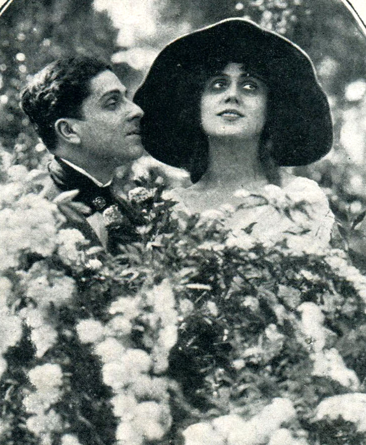 La bella e la bestia - regia di Umberto Fracchia - produz "Tespi Film" Roma - 1920 - foto scena Paolo Pezzullo + Lina Millefleurs